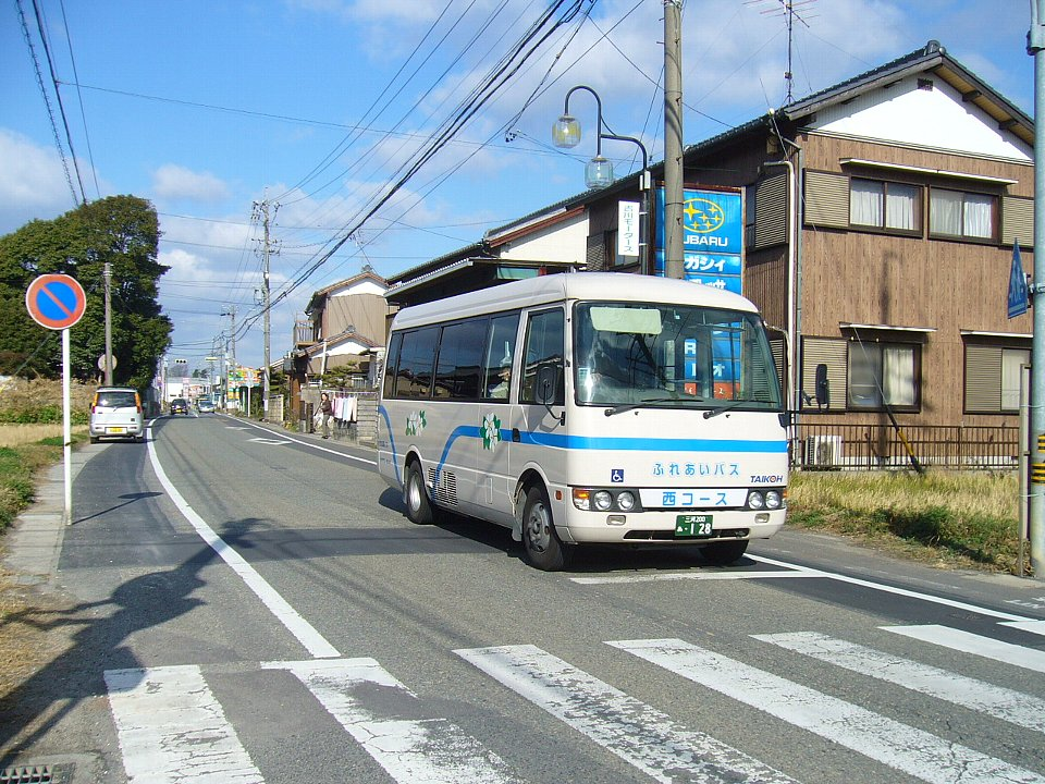 大府市循環バス 西コース 吉川町1丁目バス停付近にて